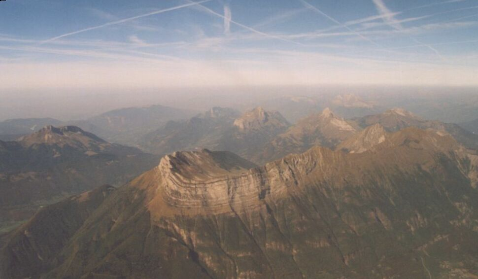 Massif des Bauges - vue d'avion de la partie est - (c) 2003 Didier Halatre. Permission vous est donnée de copier, distribuer et/ou modifier ce document selon les termes de la Licence GNU Free Documentation License, Version 1.2 ou ultérieure publiée par la Free Software Foundation ; sans sections inaltérables et sans pages de couverture. [1] Permission is granted to copy, distribute and/or modify this document under the terms of the GNU Free Documentation License, Version 1.2 or any later version published by the Free Software Foundation; with no Invariant Sections, no Front-Cover Texts, and no Back-Cover Texts. [2] La photo a été prise d'avion, un peu au sud de la verticale de Saint-Pierre d'Albigny à 10 500' (env. 3 200 m) vers le nord, mi-septembre 2003. Temps beau mais brumeux dans le lointain. Au premier plan, on a l'Arclusaz (Dent d'Arclusaz, 2040 m) avec sa forme caractéristique. À l'extrême-droite (est), on a le Col de Tamié, en repartant vers la gauche (vers l'oest), on a la Pointe de la Sambuy (2198 m), l'Arcalod (2217 m), la Montagne du Charbon avec le Trélod (2181 m), le Roc des Bœufs (1774 m) et le Semnoz (1699 m) dans le lointain. À gauche (ouest), derrière l'Arclusaz, c'est le Grand Colombier (2043 m). La lac d'Annecy se trouve derrière la Montagne du Charbon et le Roc des Bœufs, on distingue à l'arrière-plan dans la brume, le massif de la Tournette qui appartient au massif des Bornes.